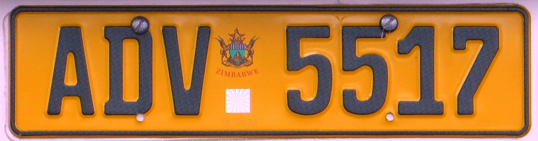 Kentekenplaat uit Zimbabwe